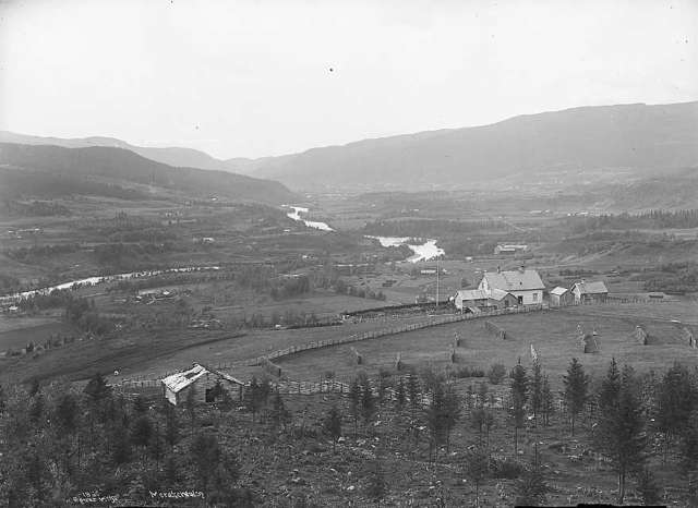 Meråker ca 1880, fotograf Axel Lindahl, bildet er hentet fra Nasjonalbibliotekets billedsamling.